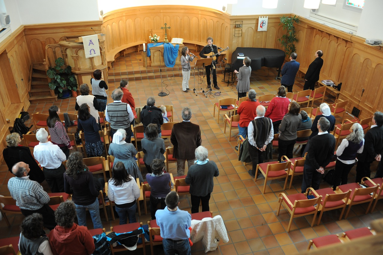 Ein Gottesdienst Anfangs Jahr 2012